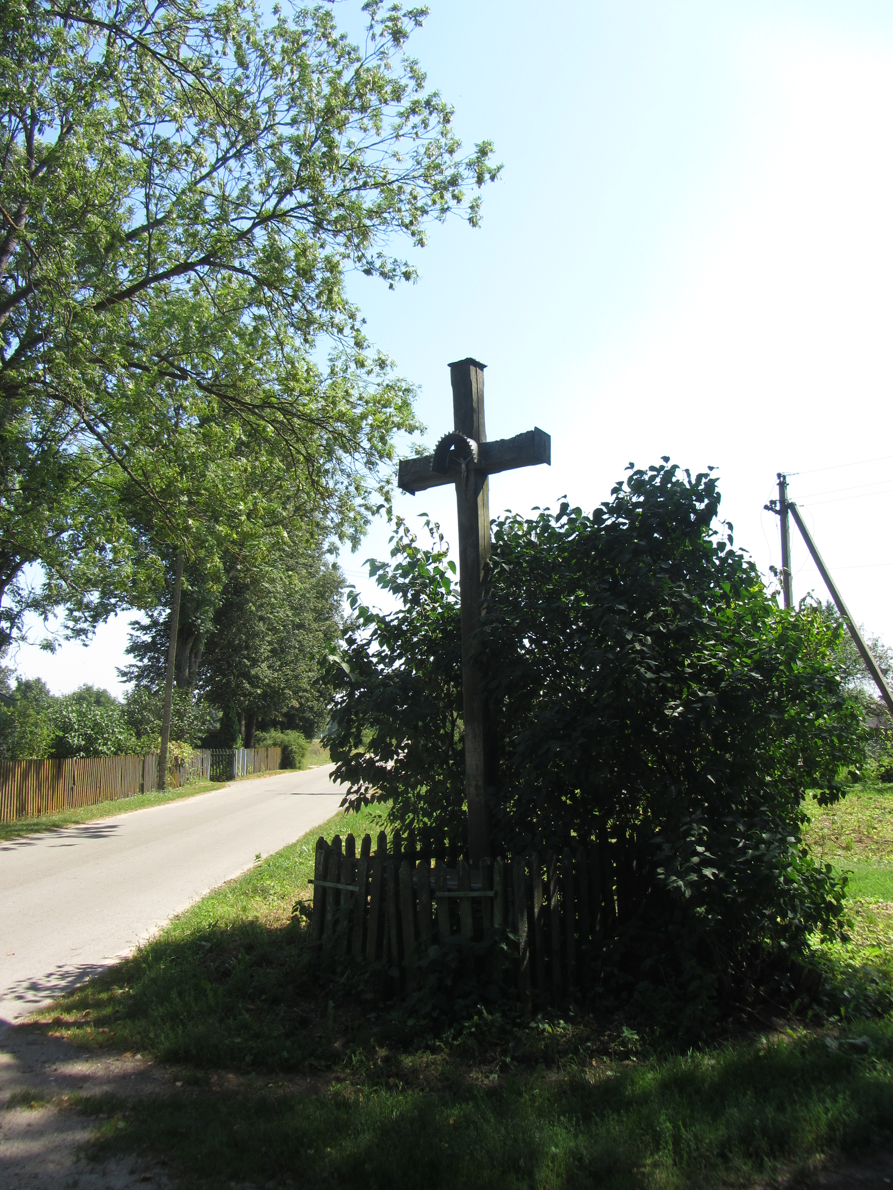 Užukenė 13183, Lithuania